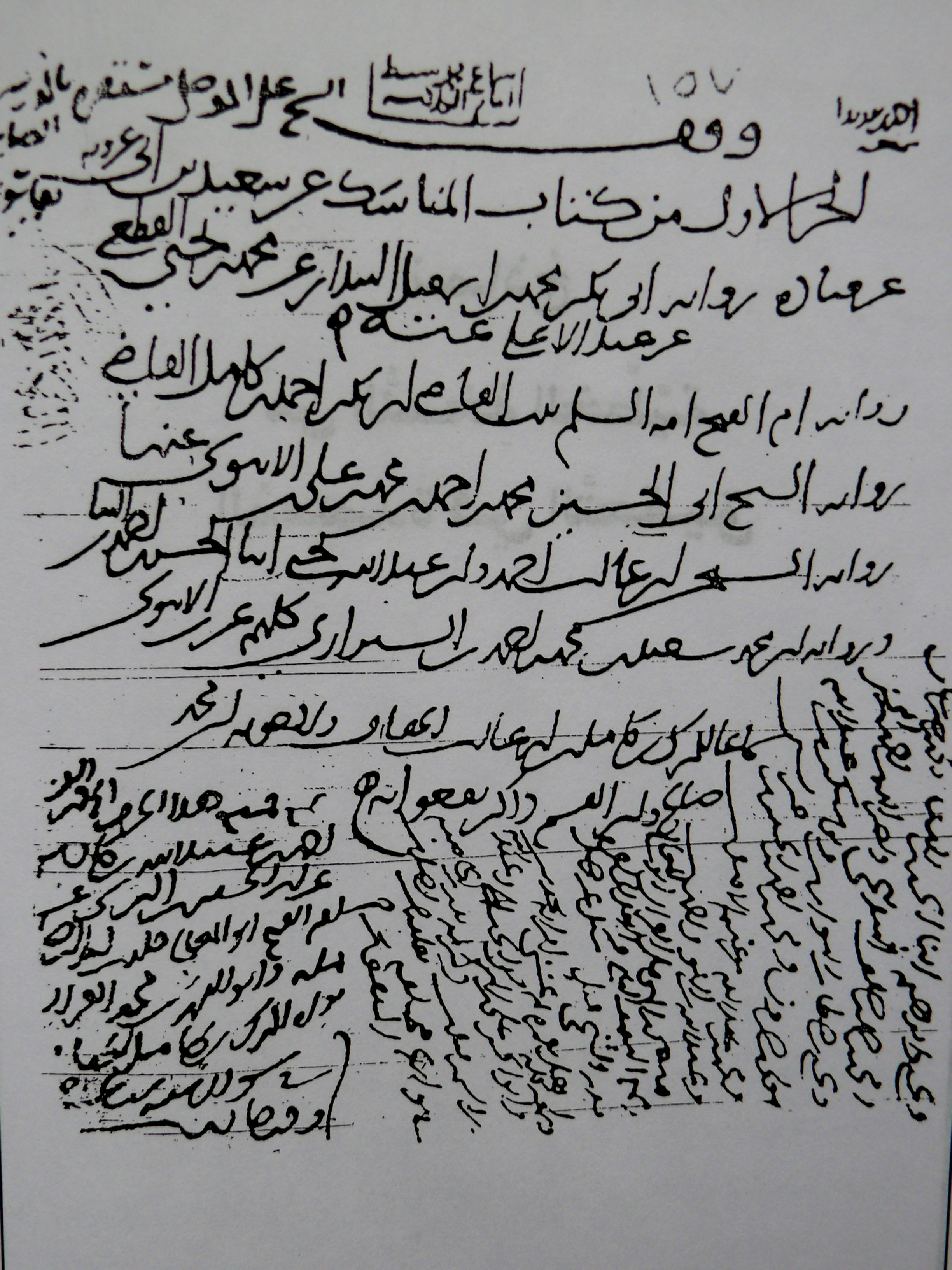 Titelblatt eines arabischen Rechtswerkes aus dem 12. Jahrhundert. Reproduktion.